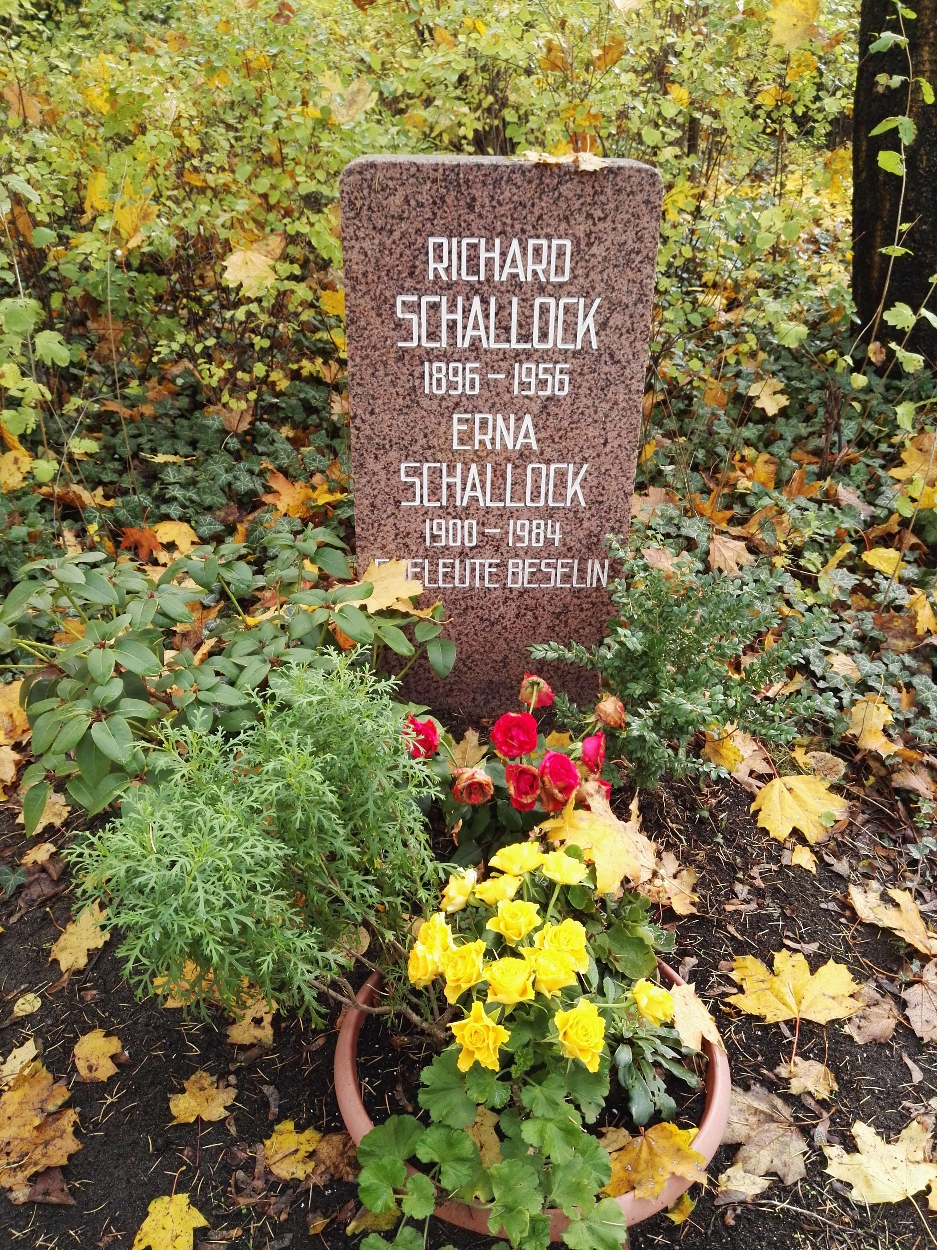 Grab von Richard Schallock und Erna Schallock auf dem Sozialistenfriedhof des Zentralfriedhofs Friedrichsfelde